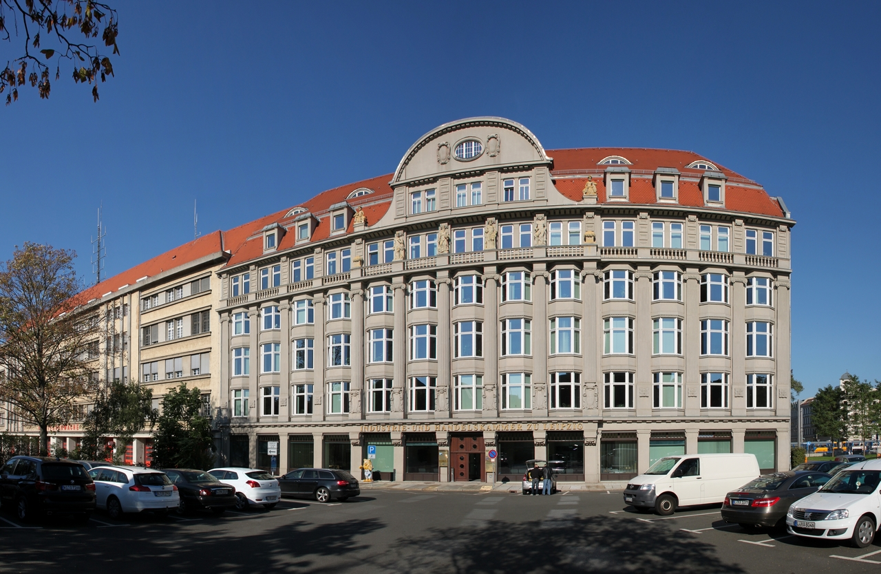 Leipzig: Blick auf das denkmalgeschützte Wohn- und Geschäftshaus Goerdelerring 5 (erbaut 1903). Das Gebäude ist der Hauptsitz der Industrie- und Handelskammer zu Leipzig.